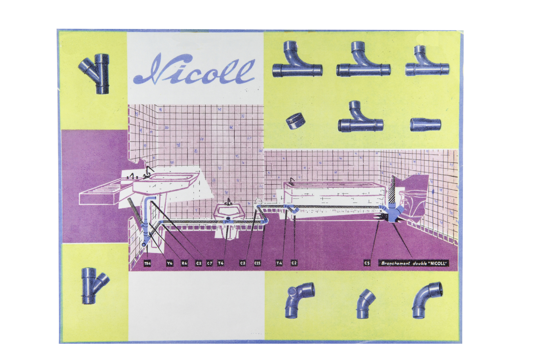 Ancienne publicité tubes et raccords plastiques Nicoll